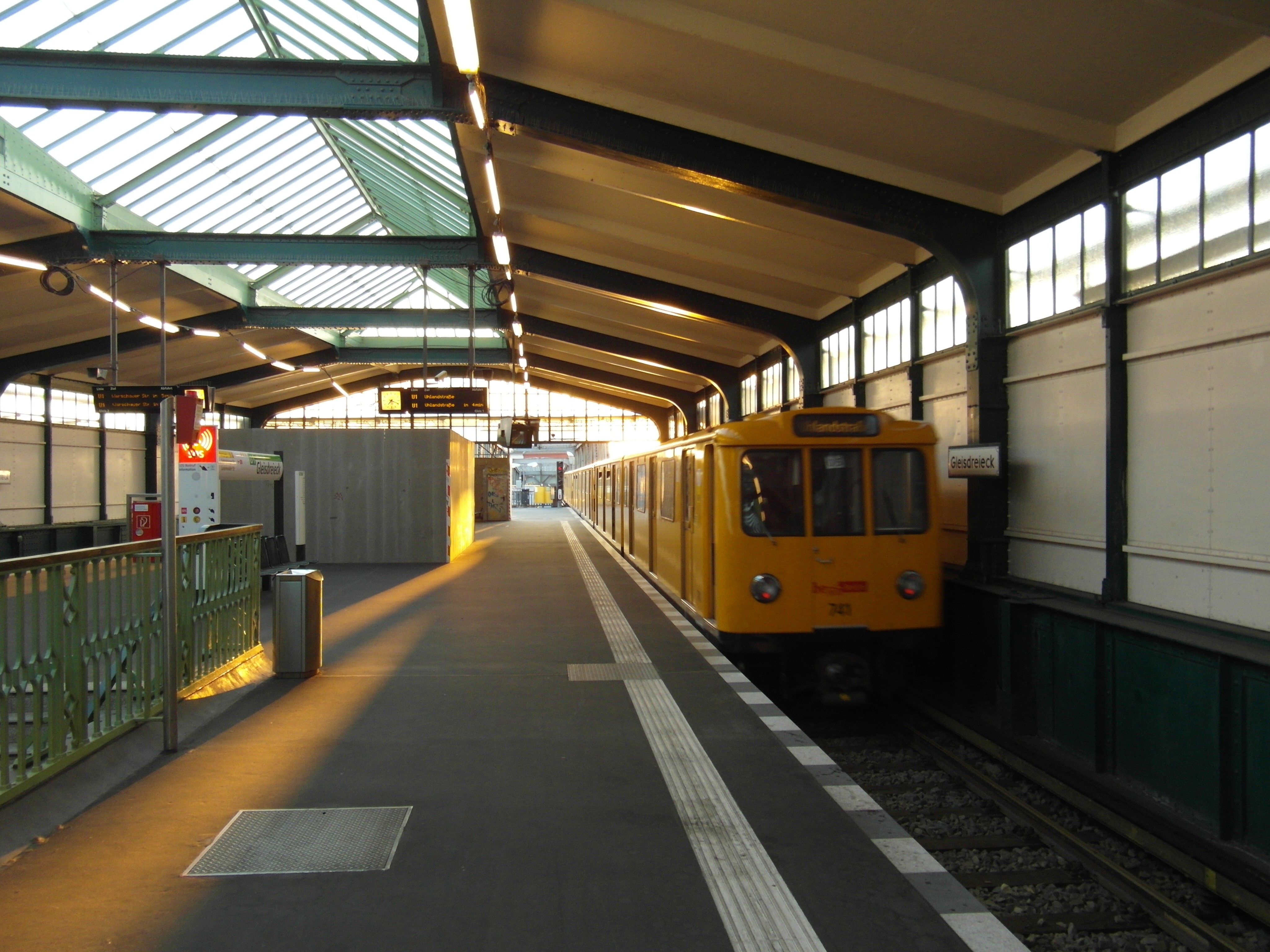 Bahnsteig der U1 (obere Ebene)